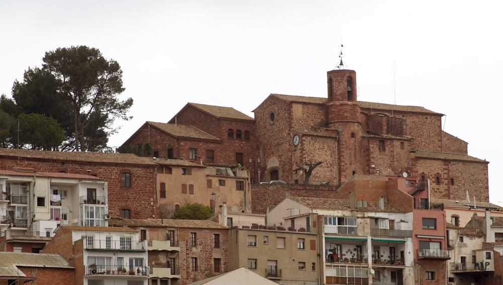 Vista de la Parroquia de Santa María y centro antiguo de Corbera de Llobregat, en Barcelona (España)